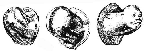 Cod Pieces, 16c